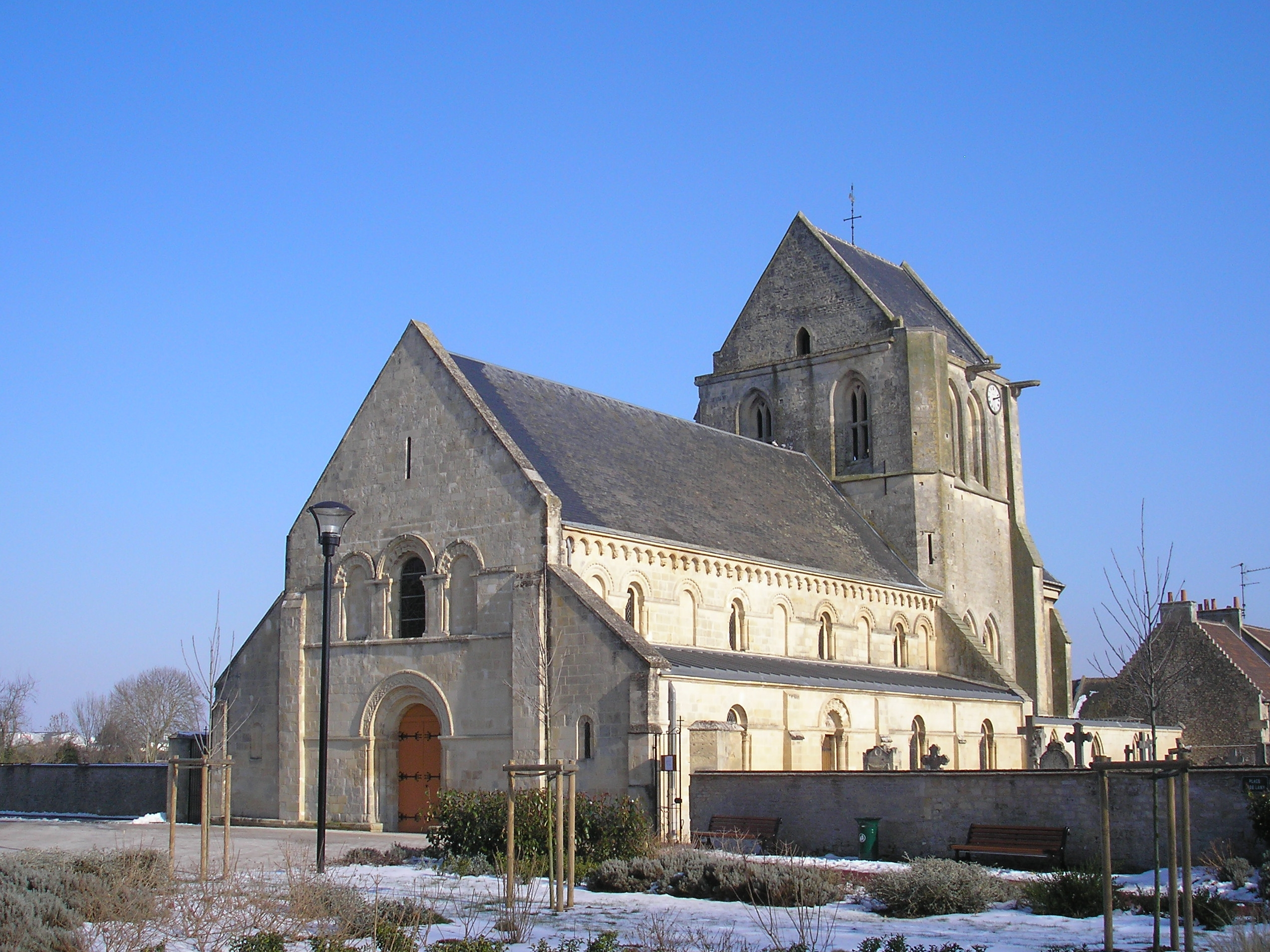 Carpiquet (Normandie, France). L'église Saint-Martin.